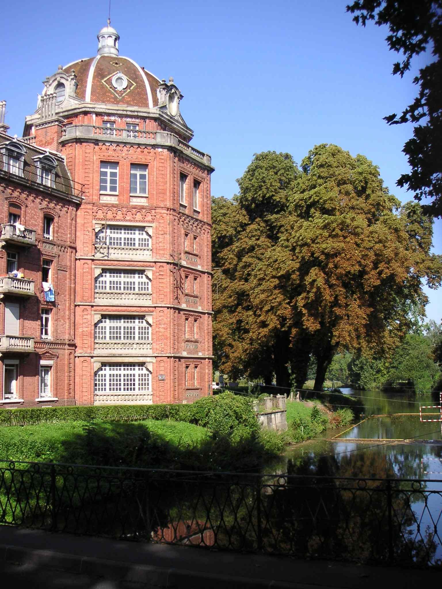 Une photo du Familistère aile Gauche de Guise prise par User:LonganimE le 03/sept/2005.